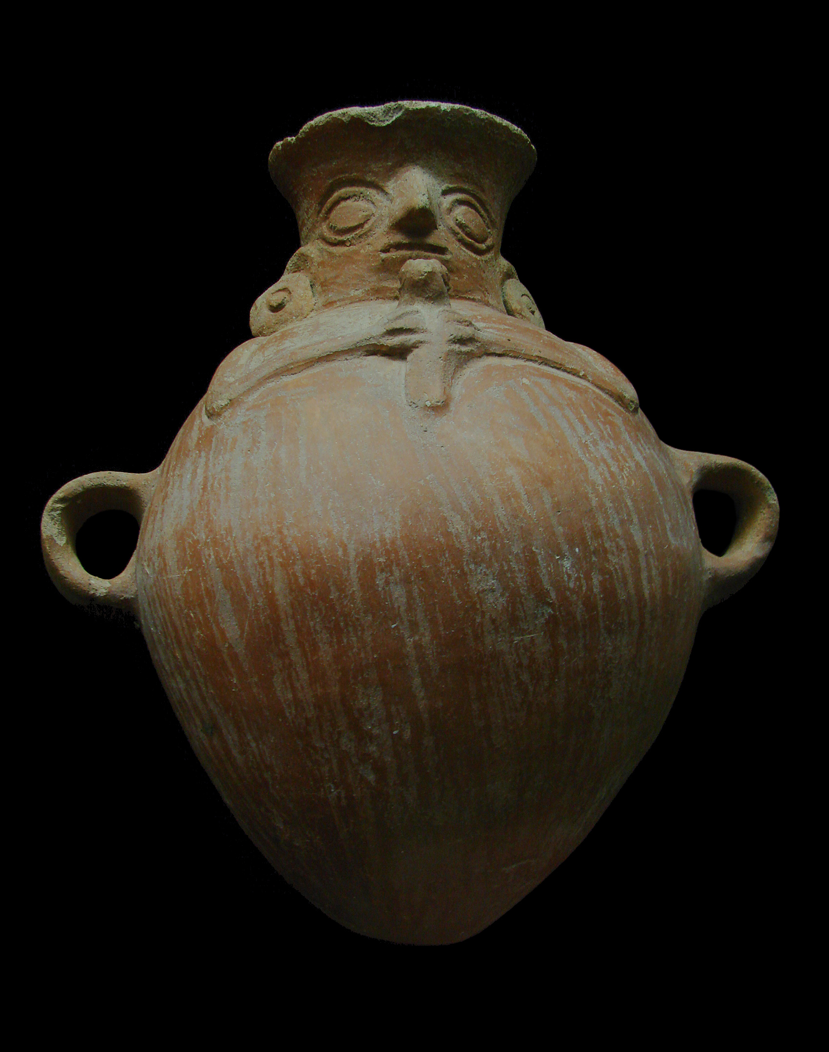 Vase anthropomorphe inca.Musée d'Auch.